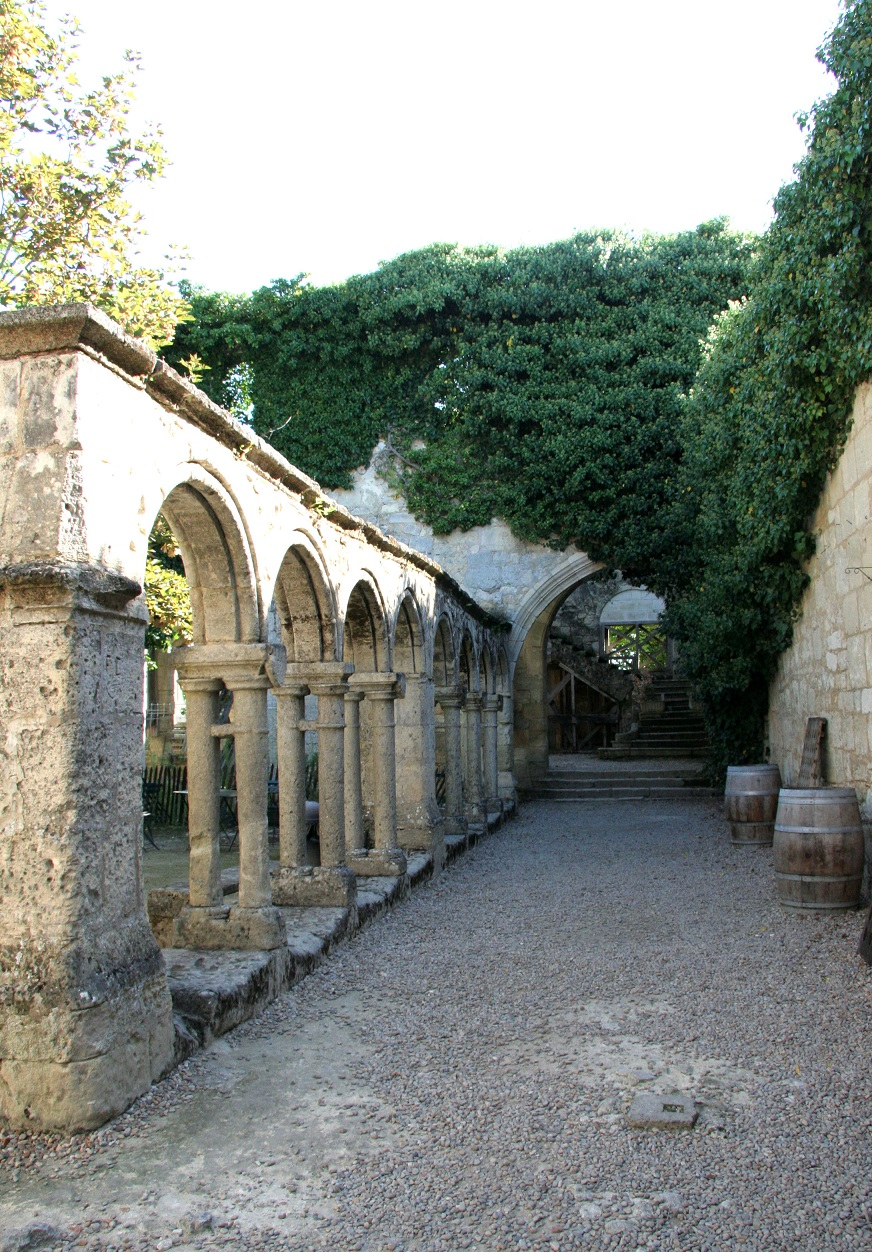 Vue du cloître des Cordeliers